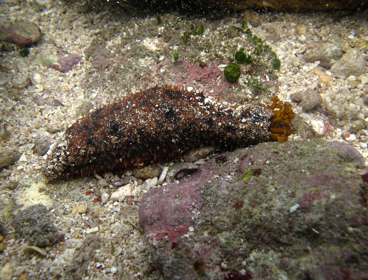 Holothurie Holothuria cinerascens à la Réunion.